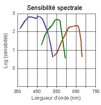 Exemple de courbes de sensibilité spectrale d'un film négatif couleurs